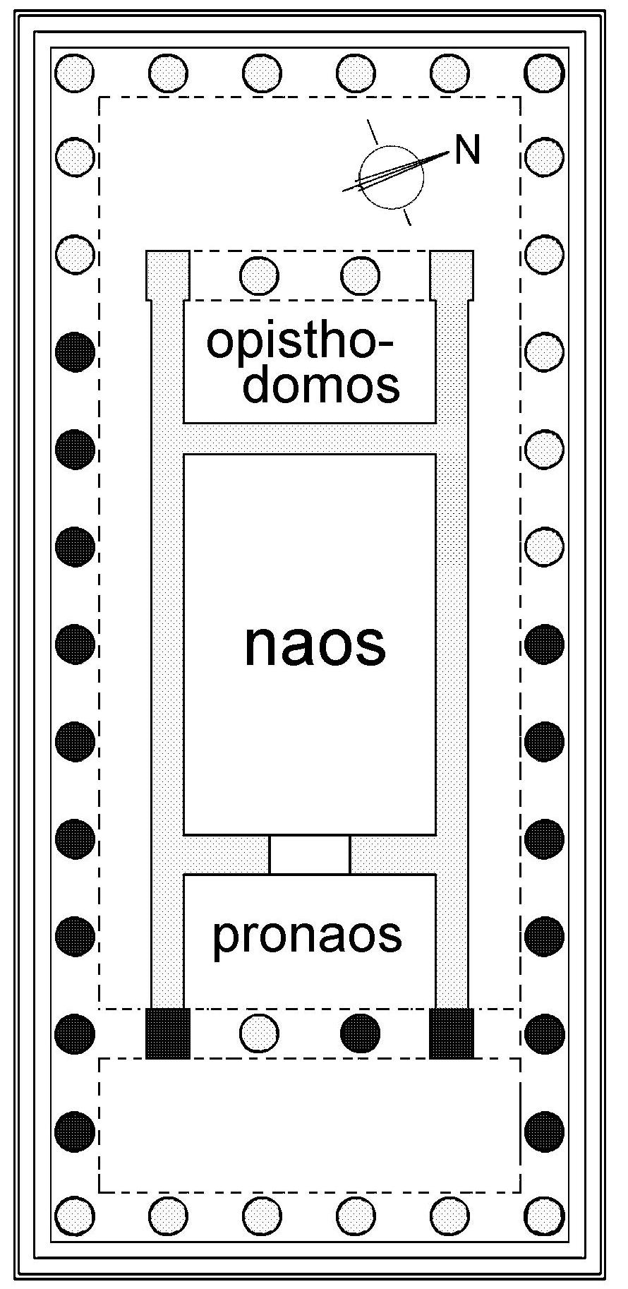 eigen werktekening